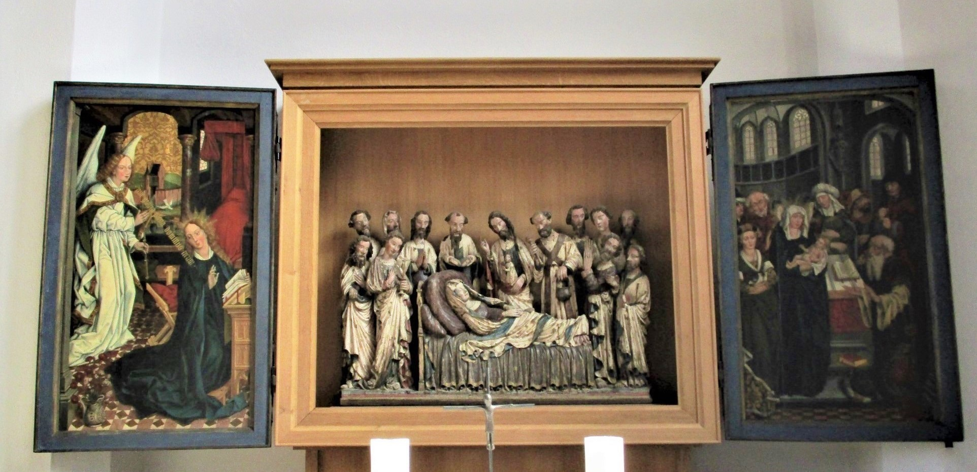 Maria-Schlaf-Altar, Kirche St. Elisabeth, Frankfurt am Main-Bockenheim